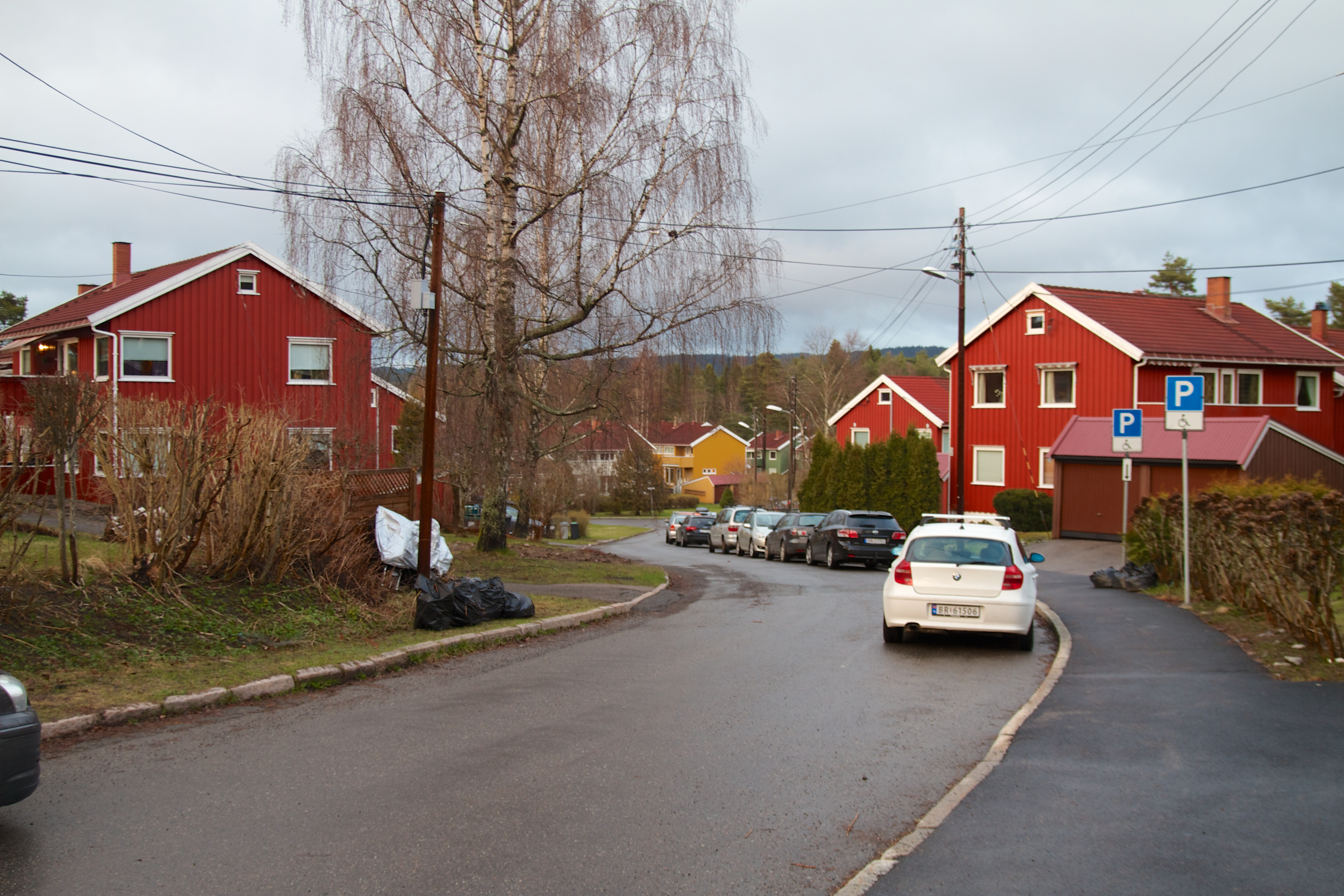 Nøklesvingen på Bøler i Oslo.